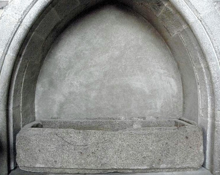 Sarcophage de Saint-Samson en la cathédrale Saint-Samson de Dol-de-Bretagne (35).